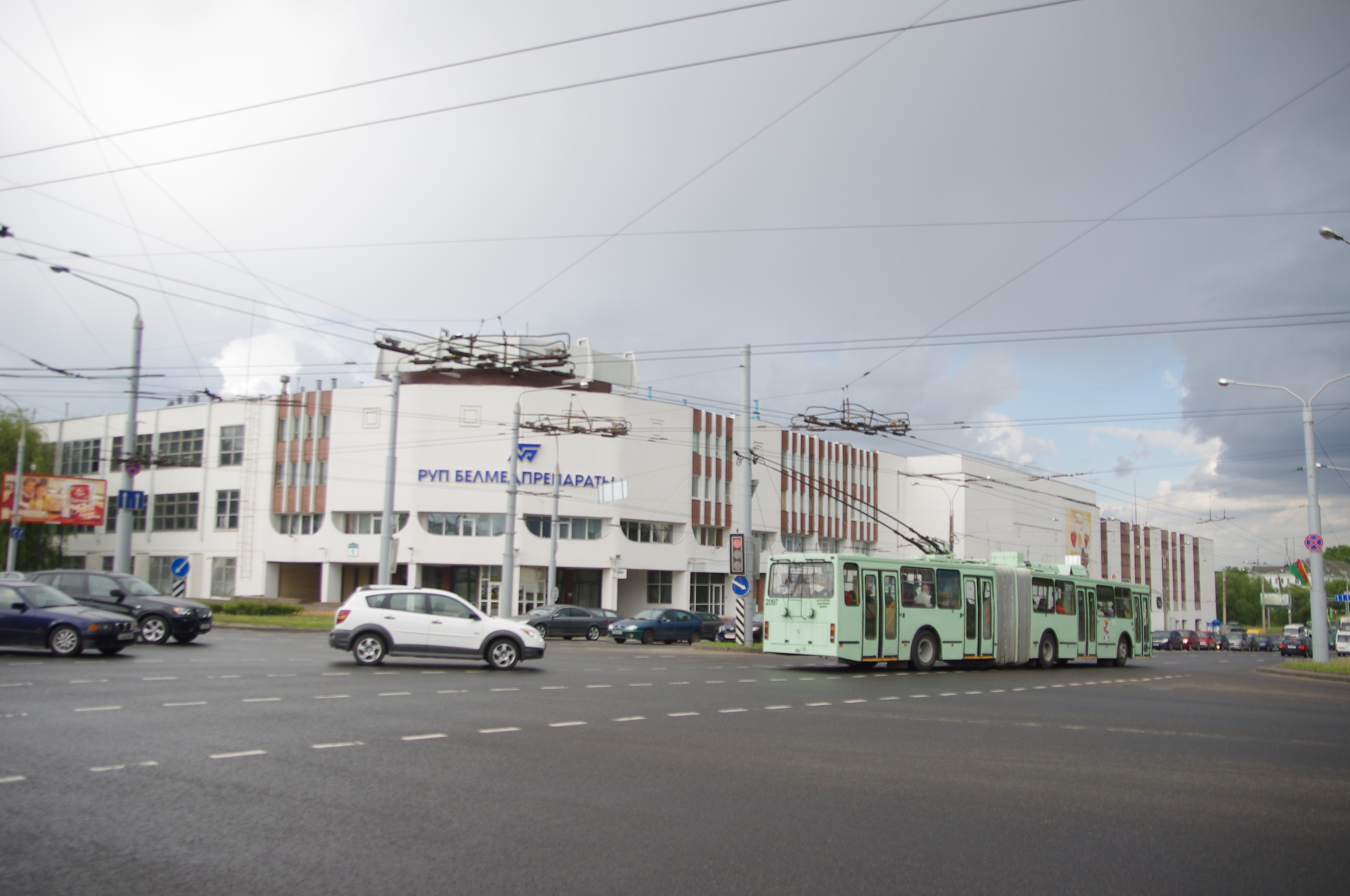 Minsk, Belarus